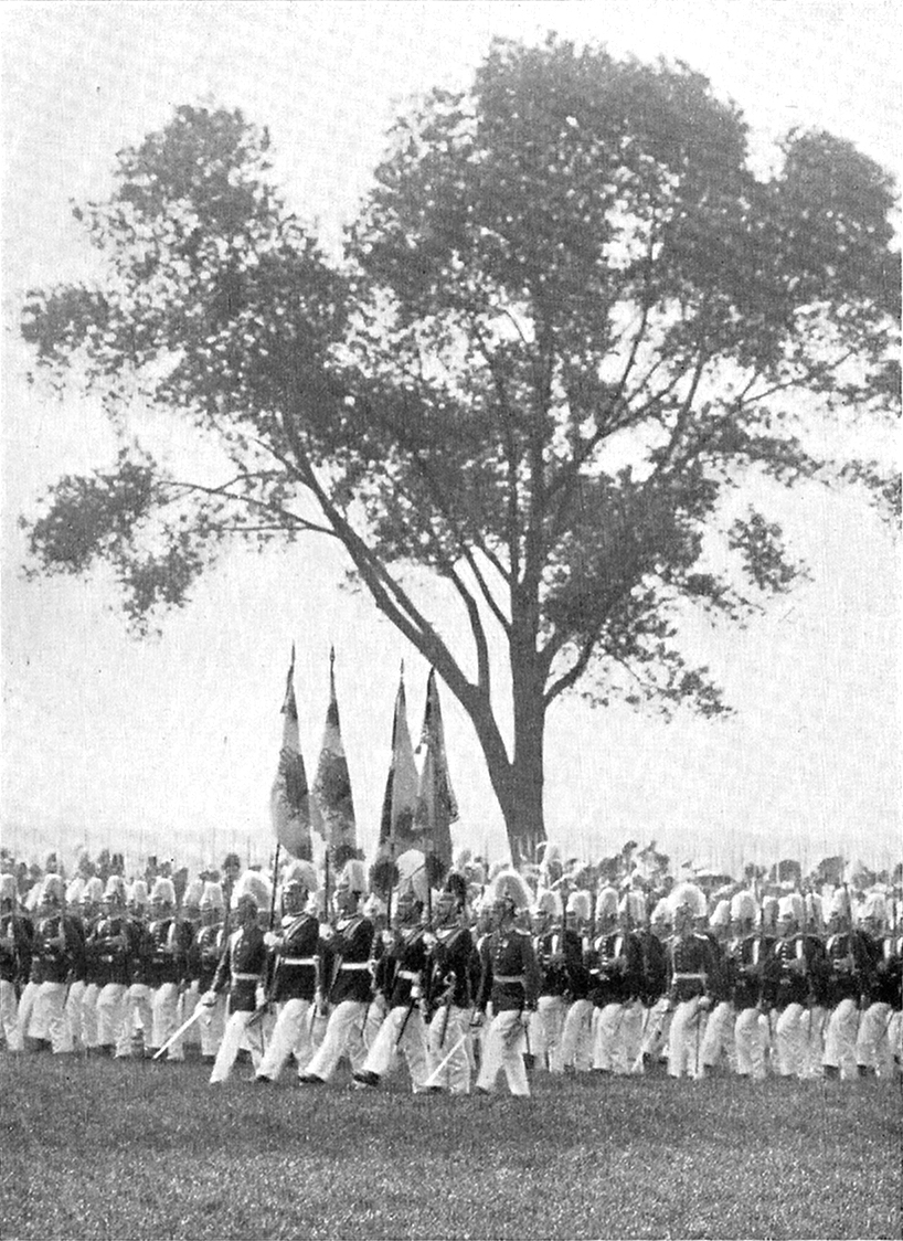 Die historische Pappel auf dem Tempelhofer Felde. Sie stand seit der Zeit des Soldatenkönigs und Friedrich des Großen. Hier zieht das 3. Garde-Regiment an ihr vorbei. Die Fahne des II. Bataillons (zweite von links) nahm der Held von St. Leonard mit ins Grab.